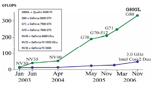 CPU ir GPU slankaus kablelio operacijos per sekundę